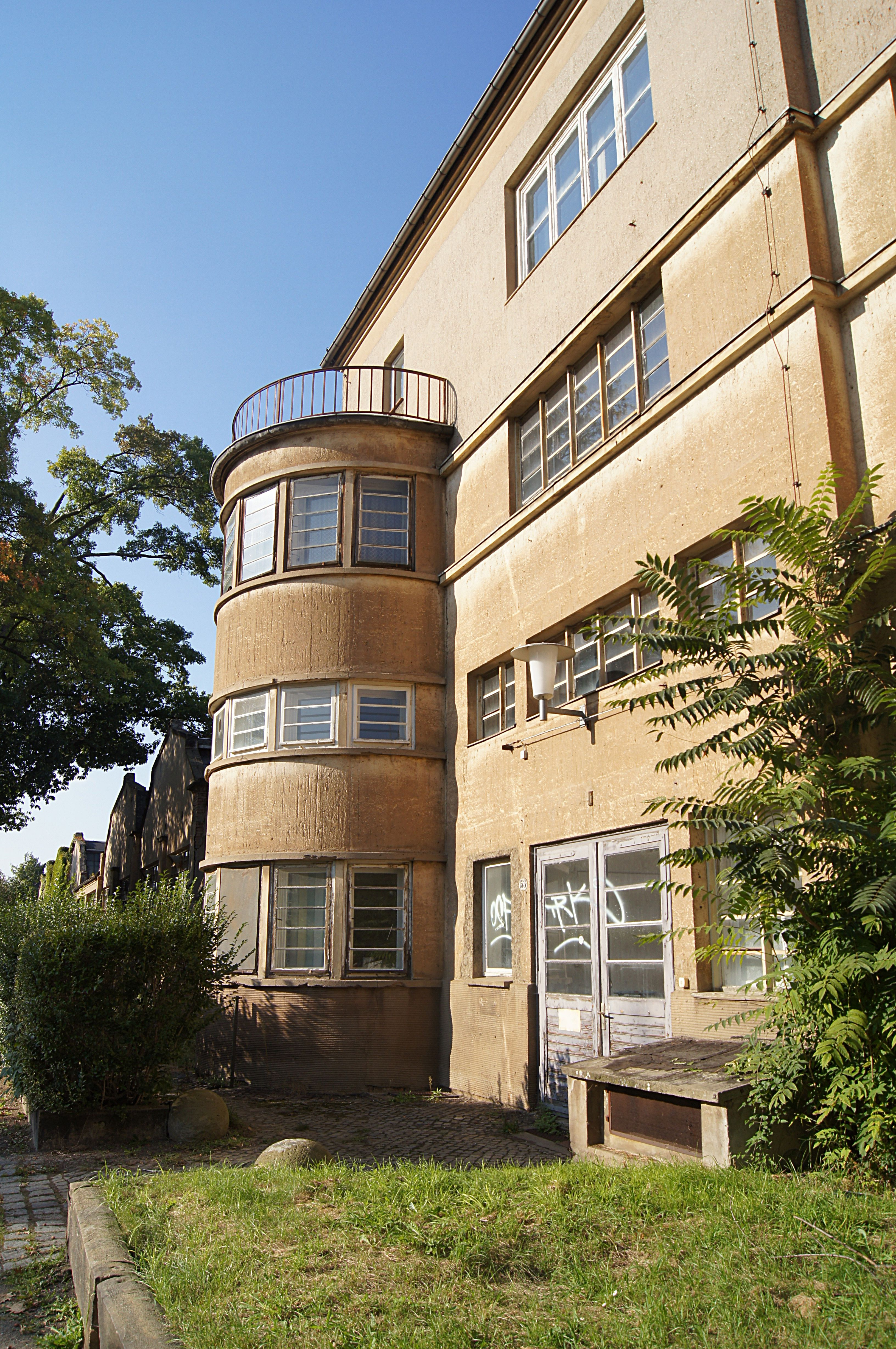 Gebäude auf dem Gelände des Betriebshofs Tolkewitz, an der Kipsdorfer Straße.